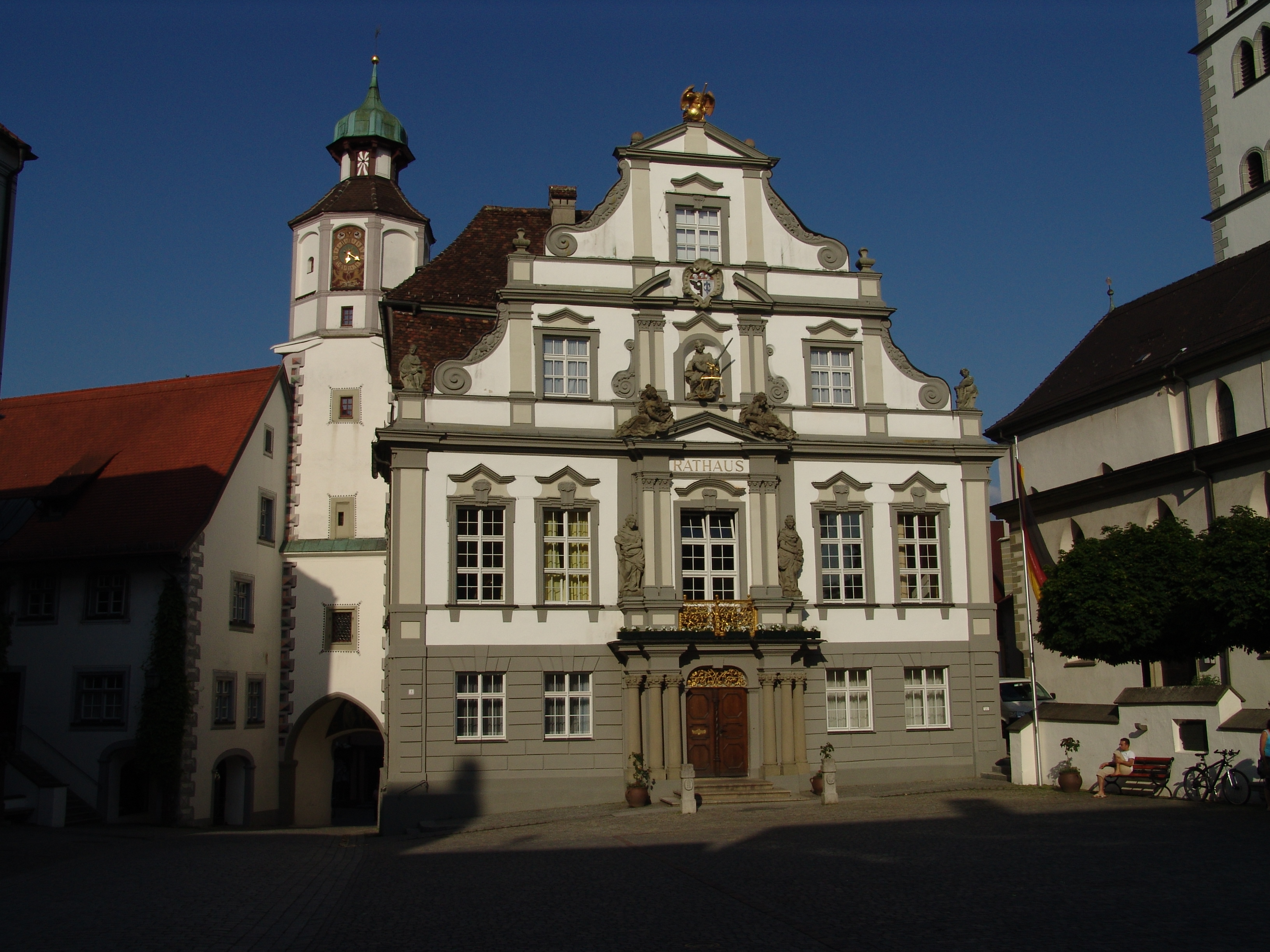 Wangen im Allgäu, Rathaus